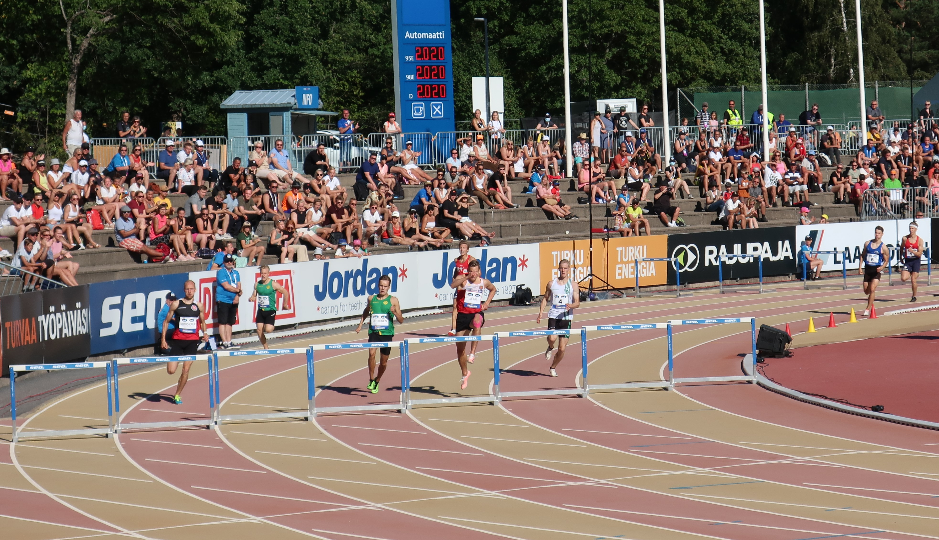 Miesten 400 metrin aitajuoksun loppukilpailun kärki saapumassa kahdeksannelle aidalle Kalevan kisoissa 2020. Neljännellä radalla oleva hopeamitalisti Oskari Mörö johtaa vielä niukasti ennen viidennellä radalla juoksevaa kultamitalistia Tuomas Lehtosta ja kolmannella radalla juoksevaa pronssimitalistia Jonni Blomqvistia.